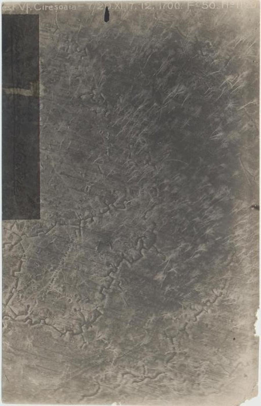 Fotografie aeriană realizată în zona Vârfului Cireșoaia (sector Tg. Ocna – Slănic), de la 1700 m. Se văd „abatizele” din copaci doborâți. 20 noiembrie 1917.